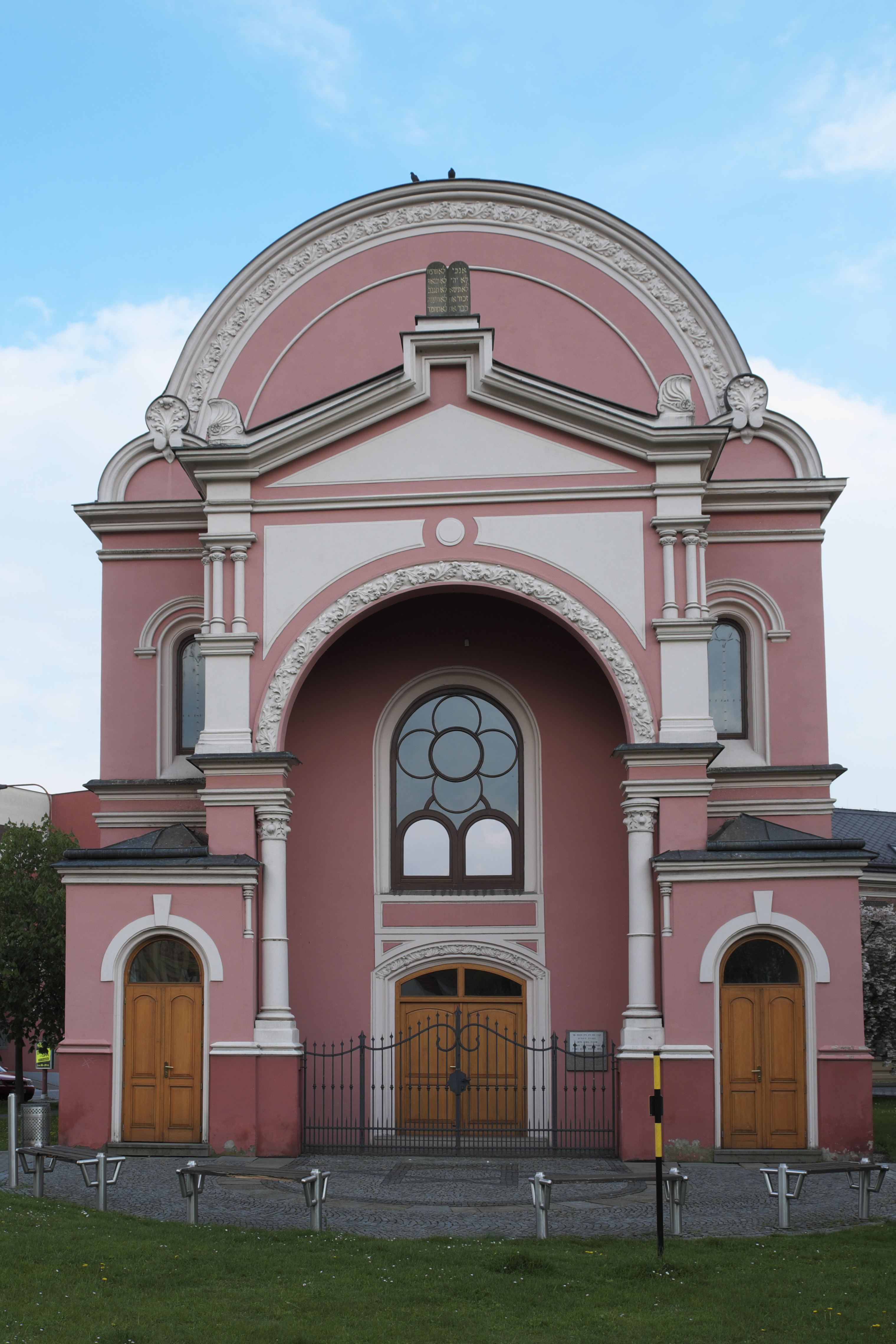 Ehemalige Synagoge, heute Bibliothek, in Uherské Hradiště in der Region Zlin in Tschechien